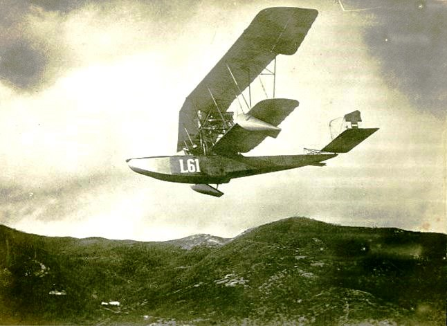 Снимка на австро-унгарски военен хидроплан над град Цетине, Черна гора.